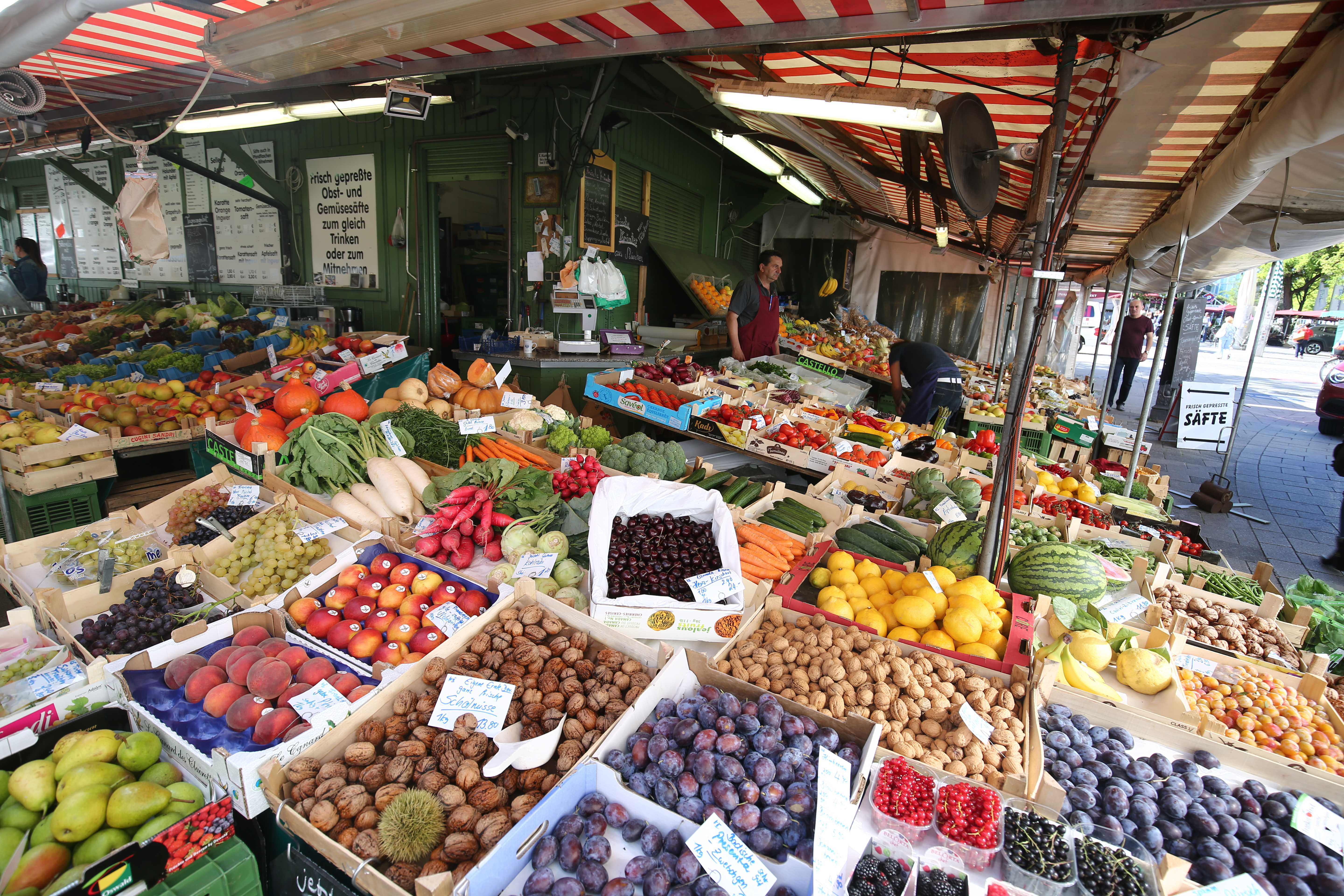 Münchner Viktualienmarkt im September 2018. Obst- und Gemüsestand in einem der alten grünen Standl aus den 1950er Jahren